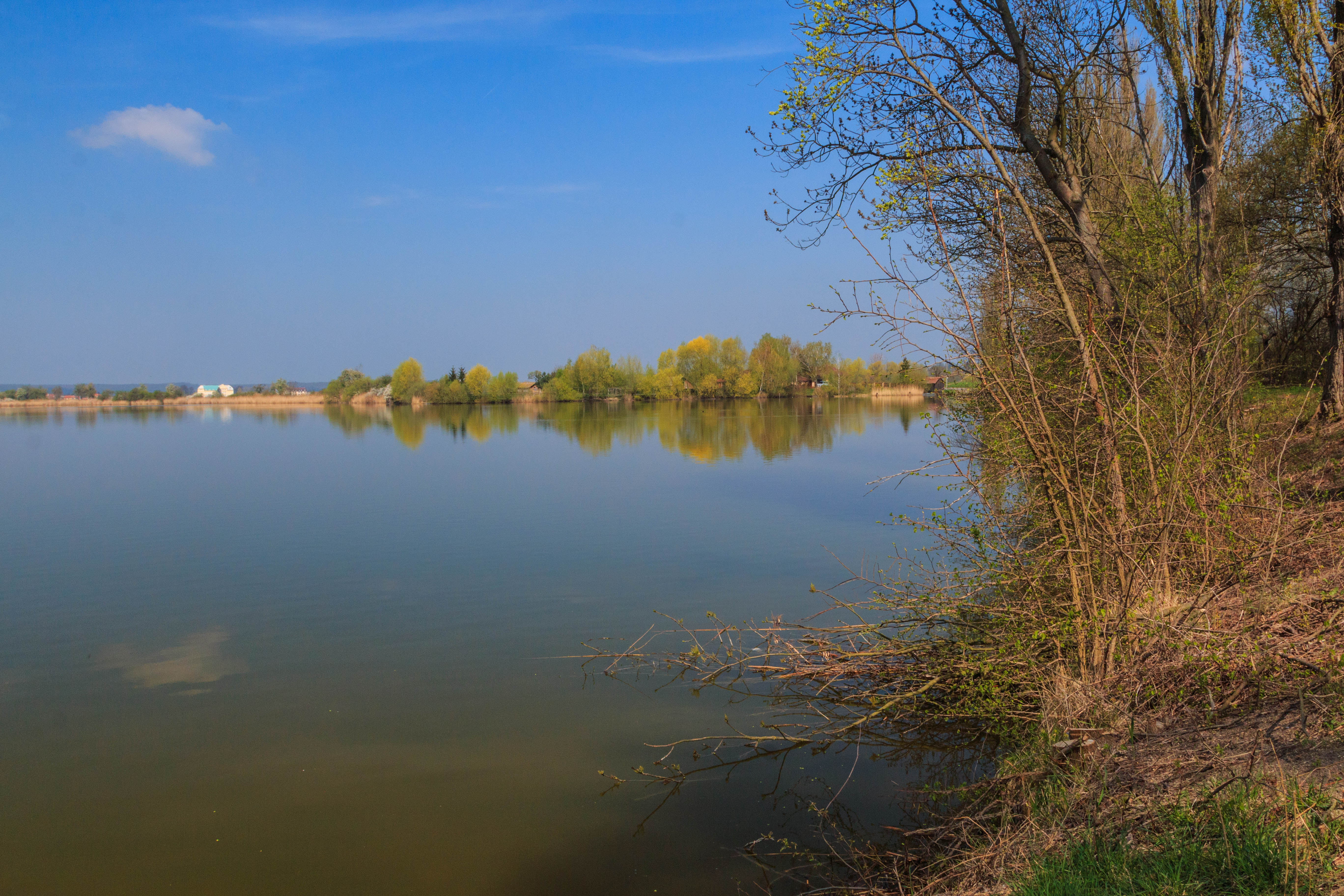 Proudnický rybník u obce Hradišťko Hradišťko II